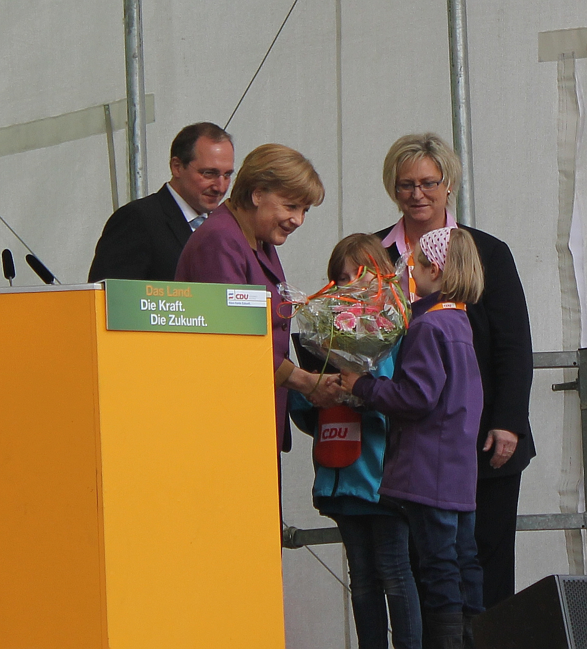 Jost de Jager und Angela Merkel sowie Susanne Herold in Flensburg zur Landtagswahl in Schleswig-Holstein 2012